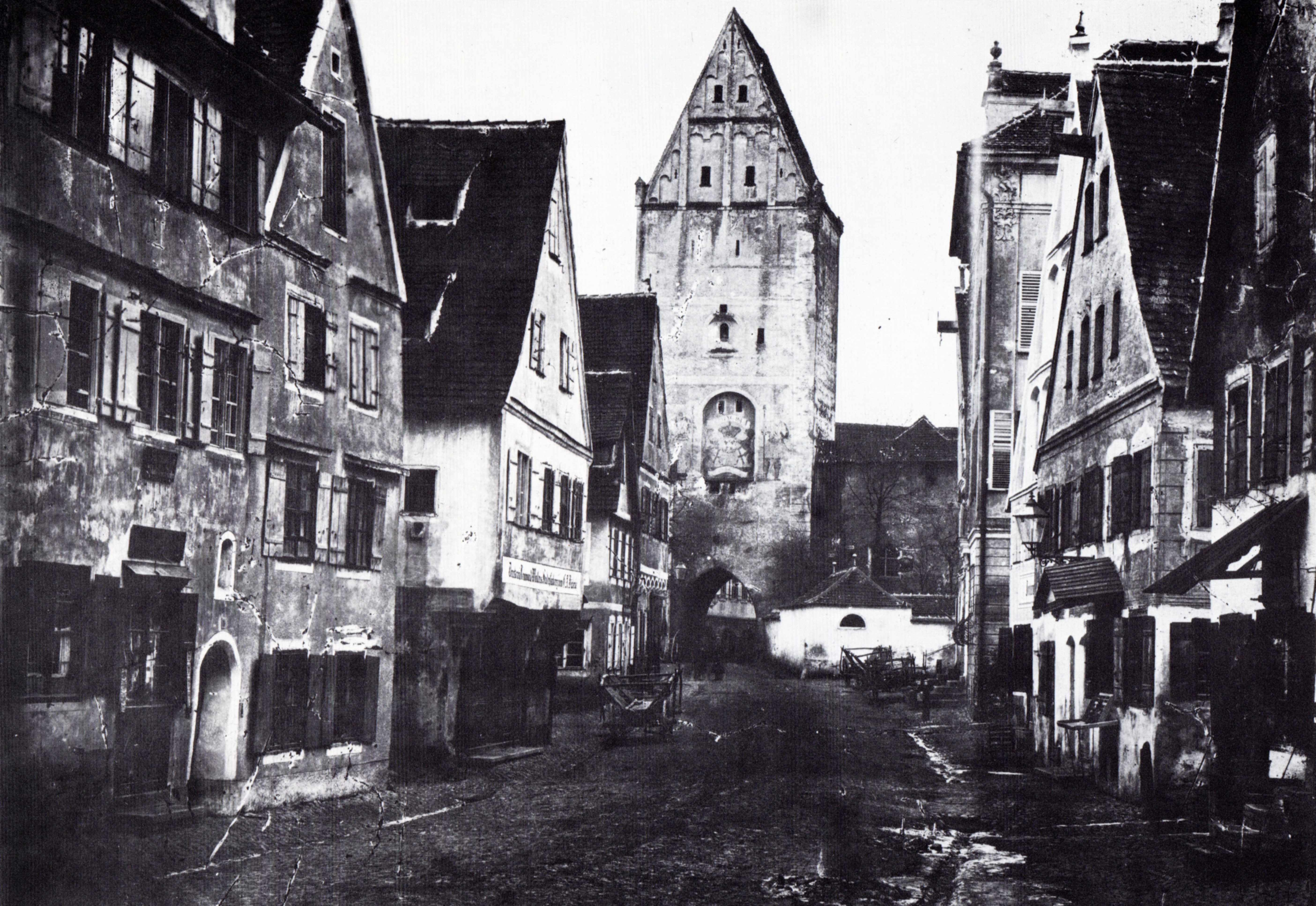 Das Notzentor von Norden mit einem kleinen Teil der Ulmer Straße. Photographie-Inkunabel um 1860.